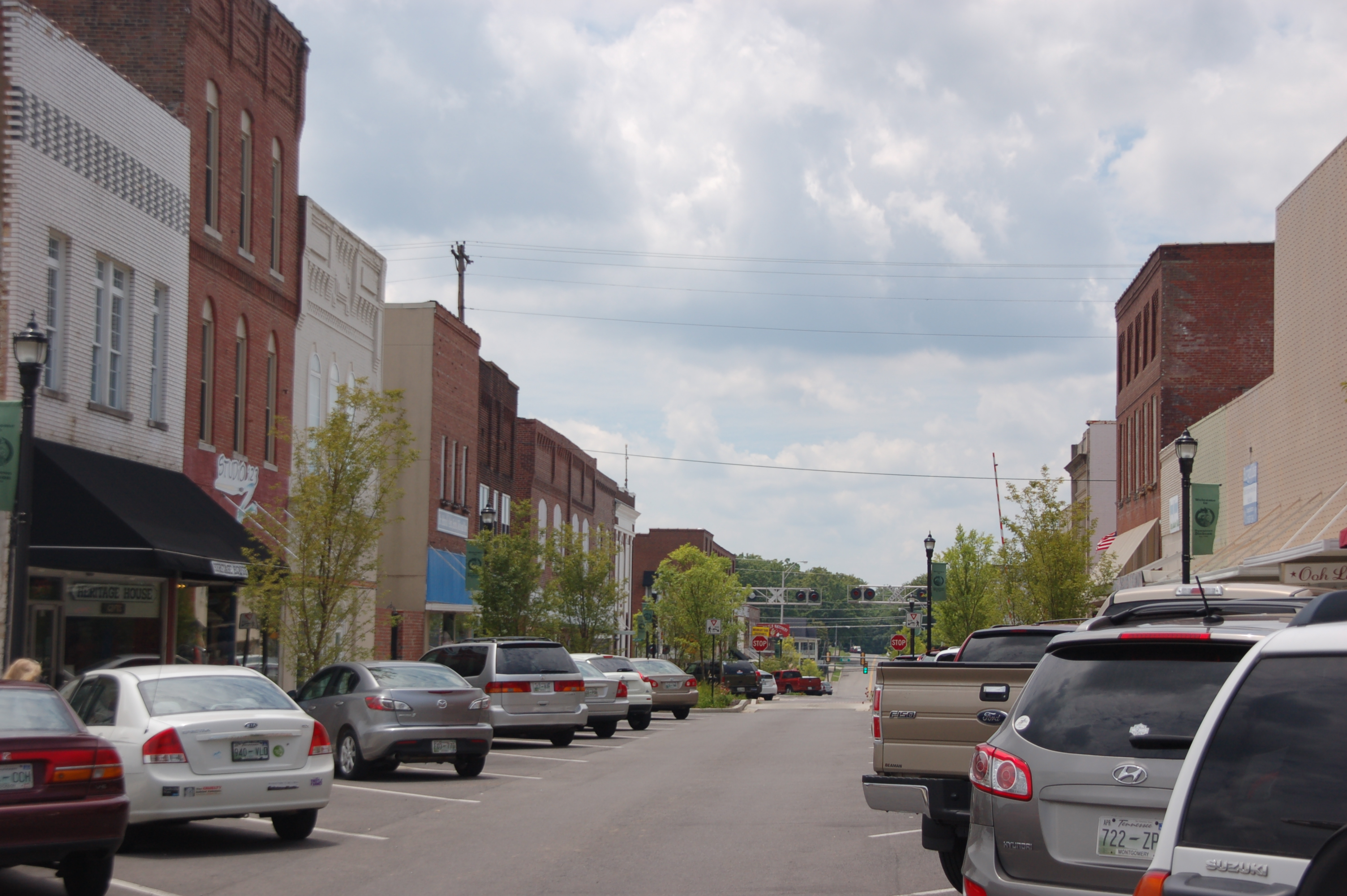 Dickson Tennessee